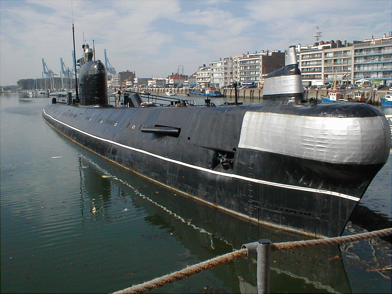 Sous marin conventionnel Russe de classe FoxTrot ici FoxTrot 480 servant de musée et amarré à Zeebruges